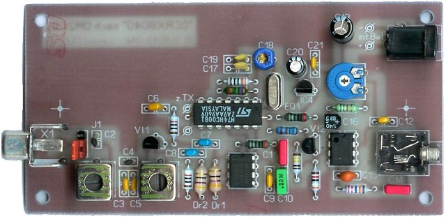 PSK31 Empfänger für das 80m-Band nach Klaus Raban, DM2CQL